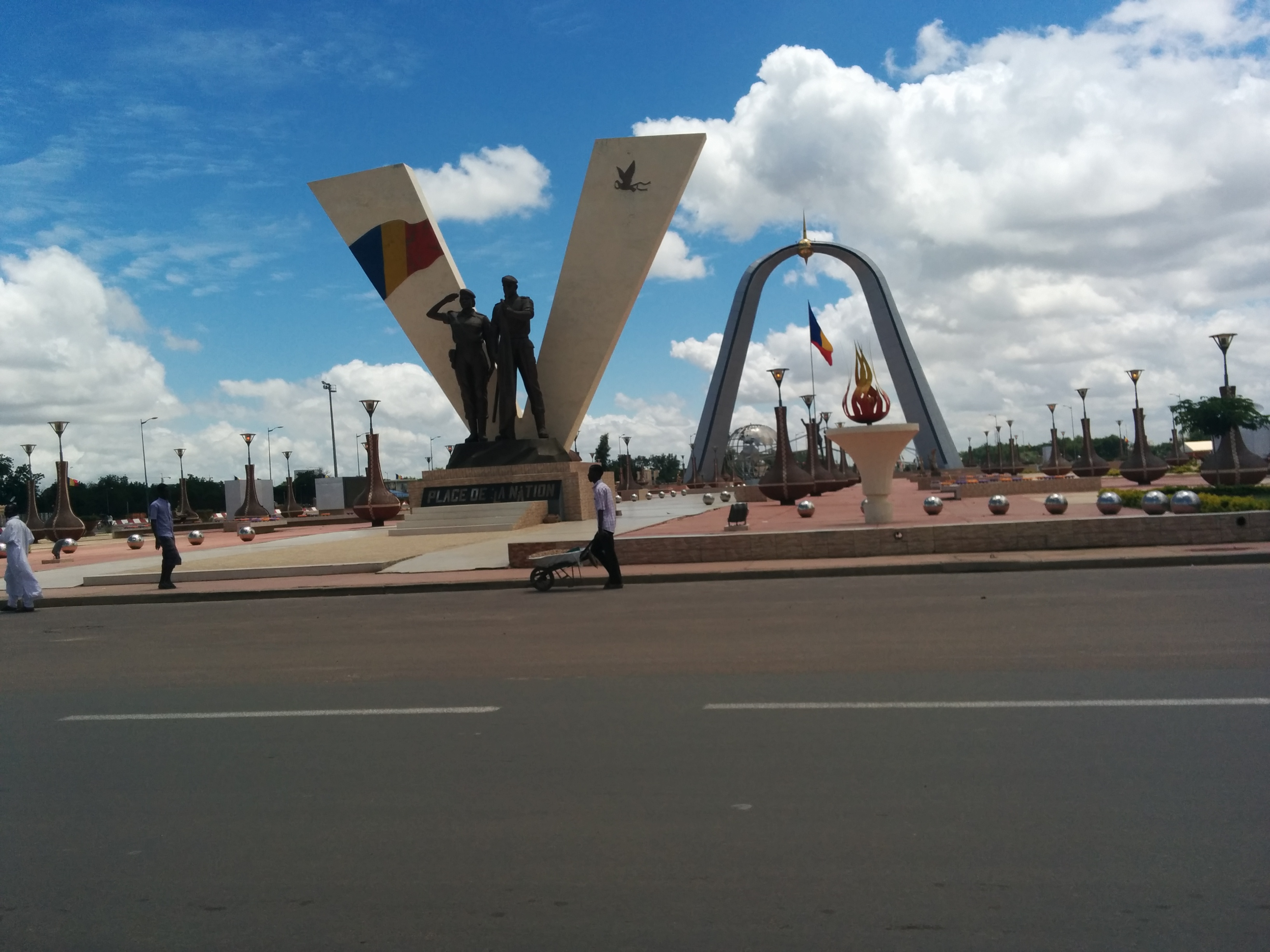 En plein centre de la capitale N'djamena , cette place fut érigée pour le cinquantenaire de l'indépendance de la République du Tchad